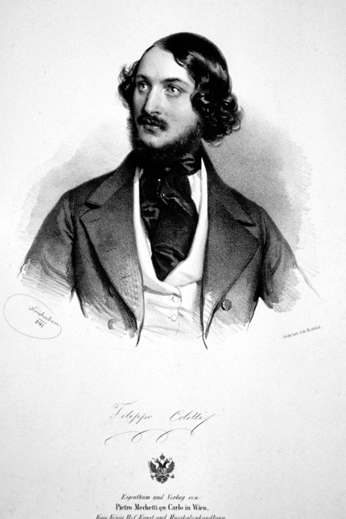 Filippo Coletti (1811-1894), itlienischer Bariton.